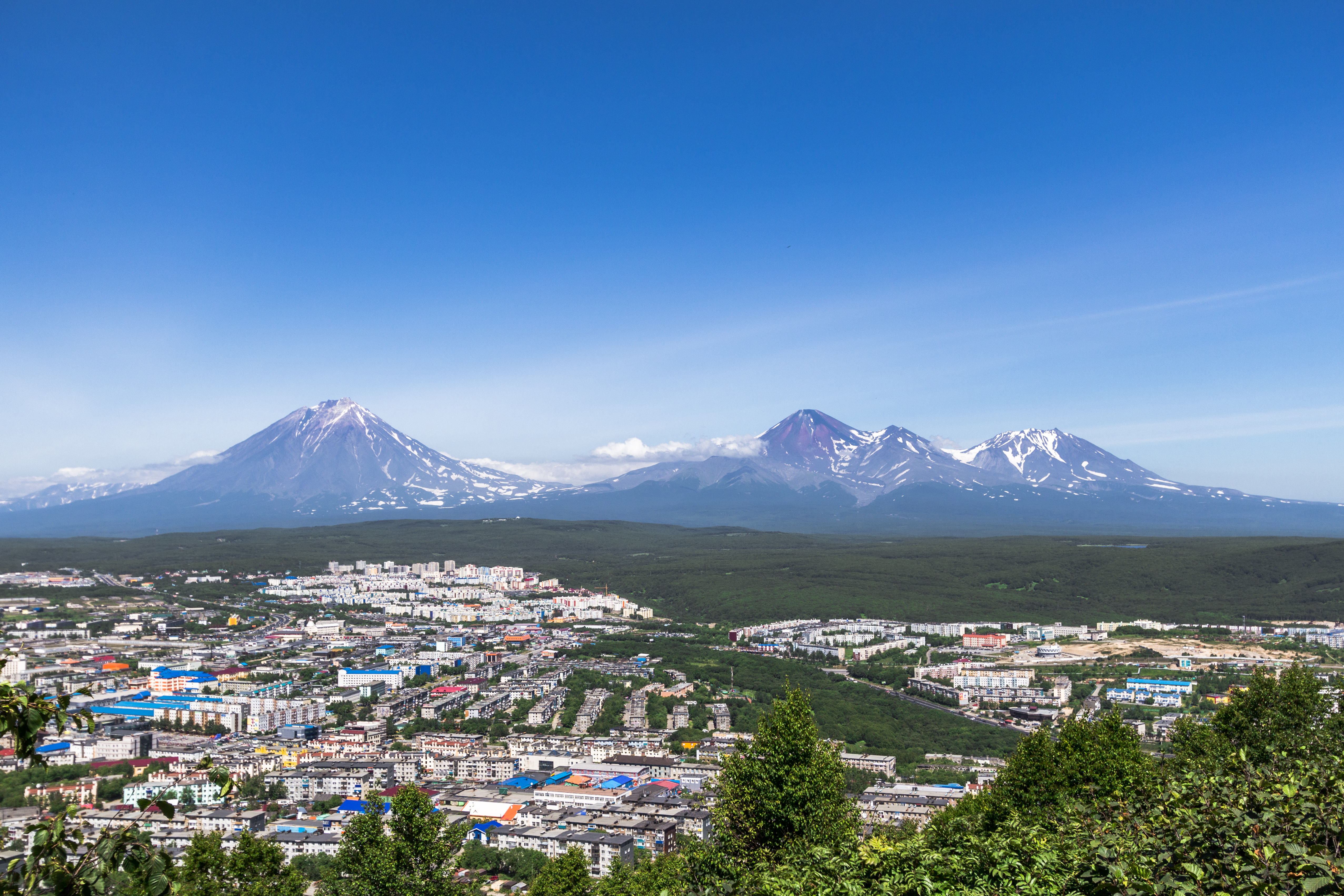 Три вулкана, Елизовский район This image is related to the protected area of Russia number 4110063